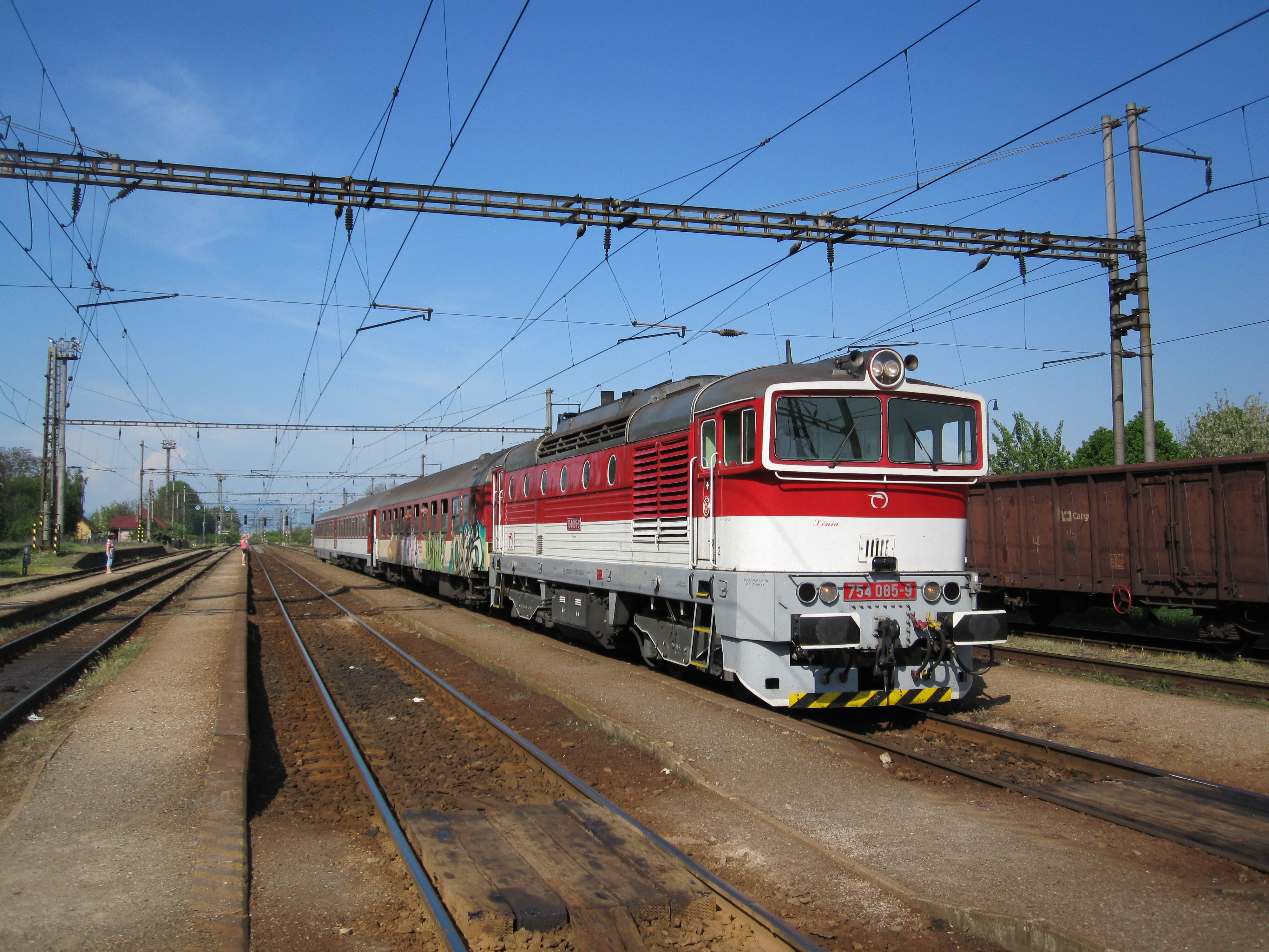 Vlak Železniční společnosti Slovensko s motorovou lokomotivou 754.085, Bánovce nad Ondavou